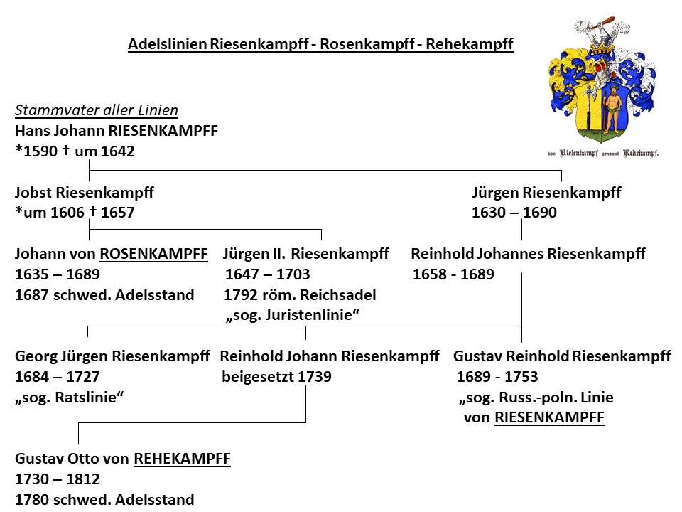 Übersichtstafel zu der Adelsfamilie Rehekampff mit Wappen